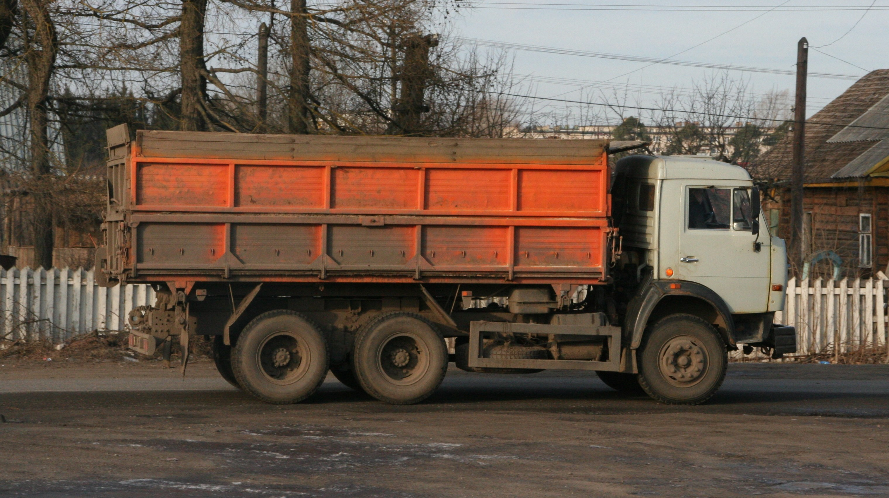 KamAZ Dreiachser als landwirtschaftlicher Kipper. Eigentum einer lokalen Farm 130km von St. Petersburg